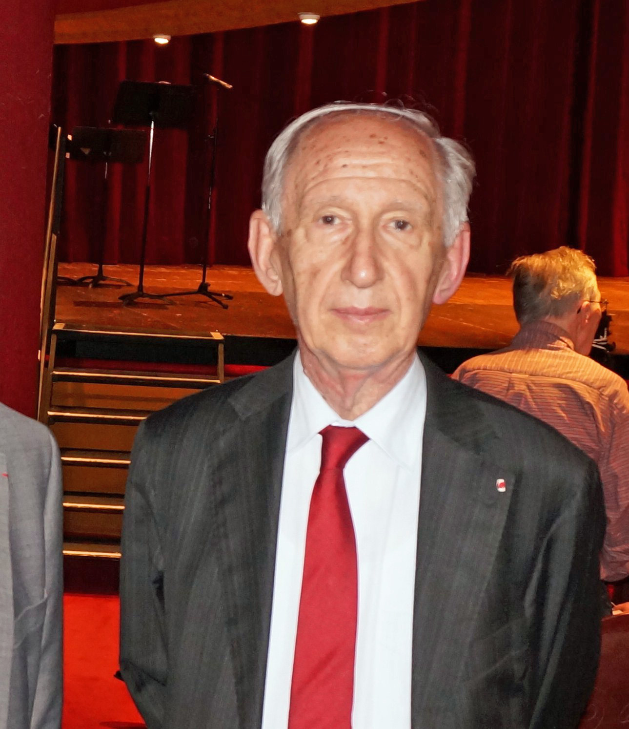 Lors de napoléon à Reims concert du bicentenaire.